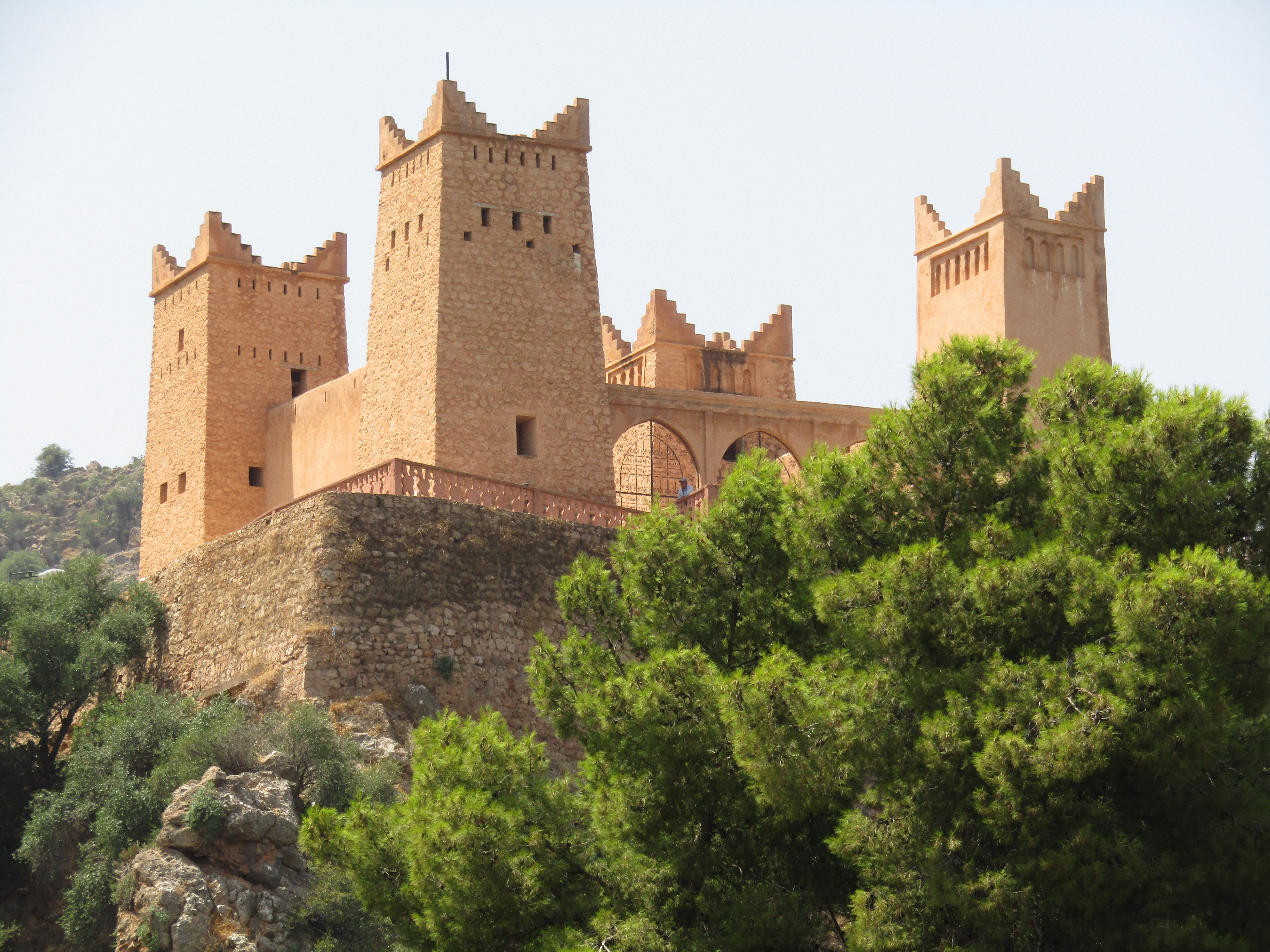 توجد هذه المعلمة بمدينة بني ملال ، وهي شامخة فوق الجبل (الأطلس المتوسط) ، تم بنائها في عهد المولى إسماعيل سنة 1688 .